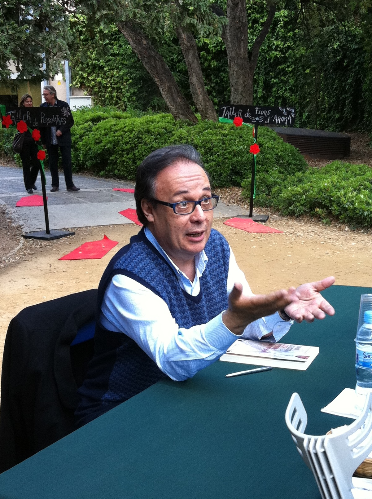 Joan Barril signant llibres a Sabadell per Sant Jordi 2011.